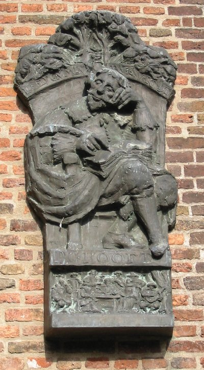 PC Hooft sculptuur op binnenplaats Muiderslot, foto gemaakt en vrij beschikbaar gesteld door Gebruiker:Ellywa